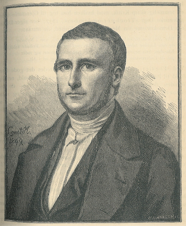 Frederik Paludan Müller, tegning lavet efter maleri af Constantin Hansen fra 1849.